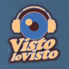 Logo de Visto Lo Visto.